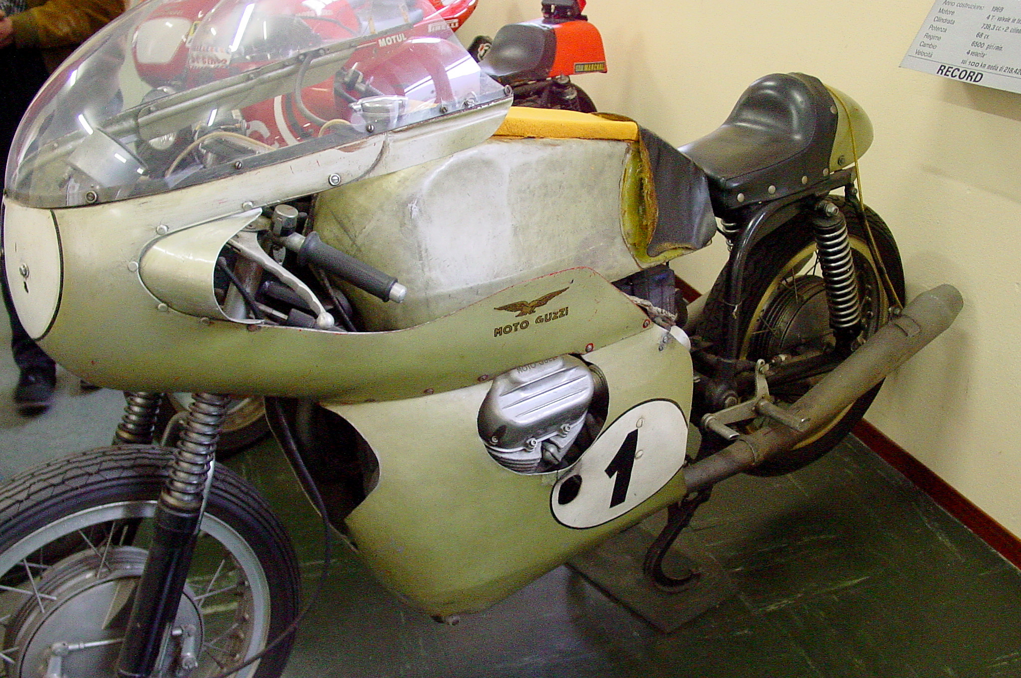 Moto Guzzi V7 - Machine de record 1969 (218 km/h)